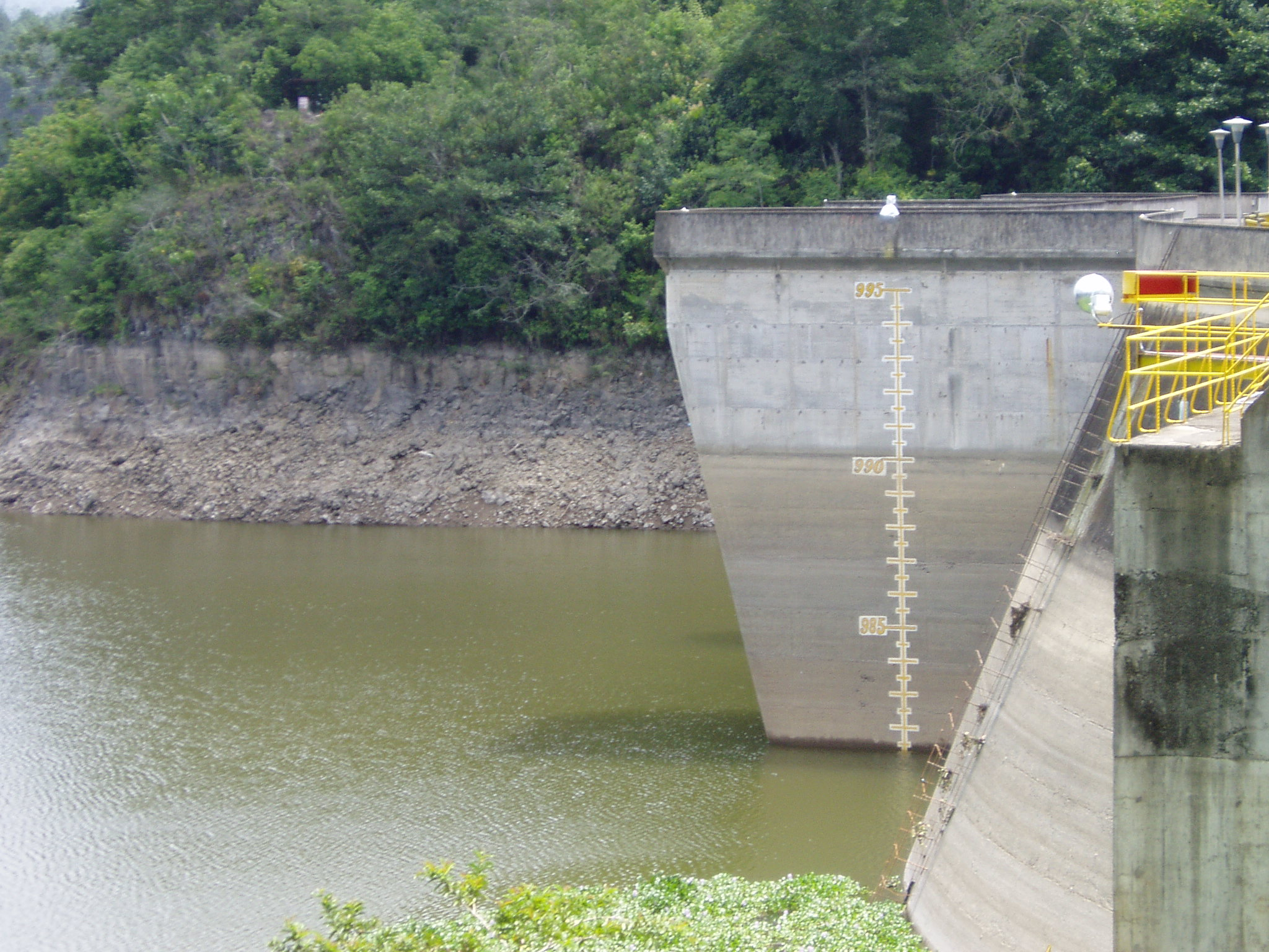 El río Reventazón, visto desde la represa hidroeléctrica de Cachí. Cartago, Costa Rica.